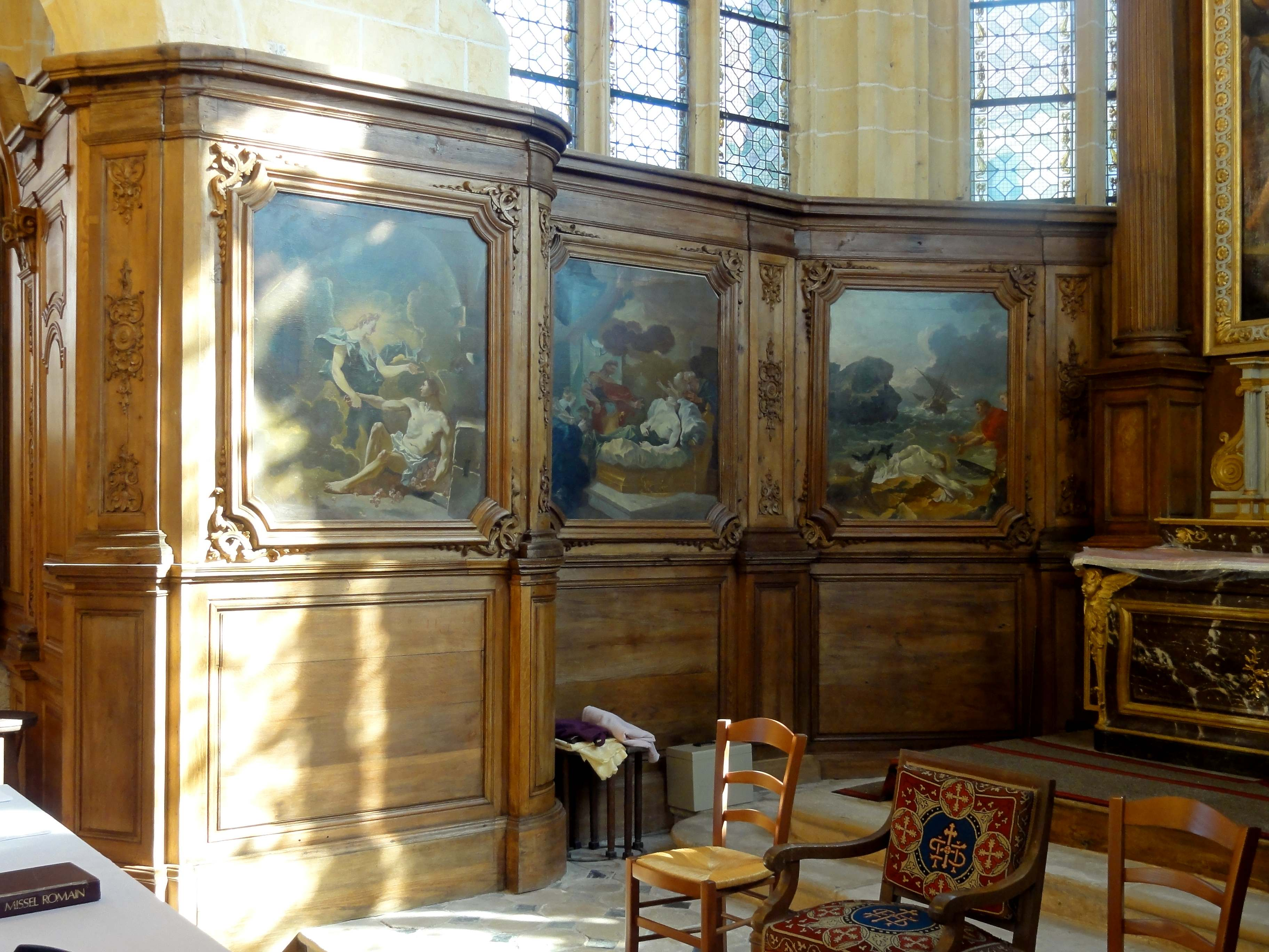 Mobilier de l'église (voir titre).